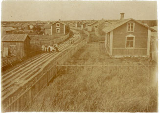 Kuva Simonkylältä 1940-luvulla.